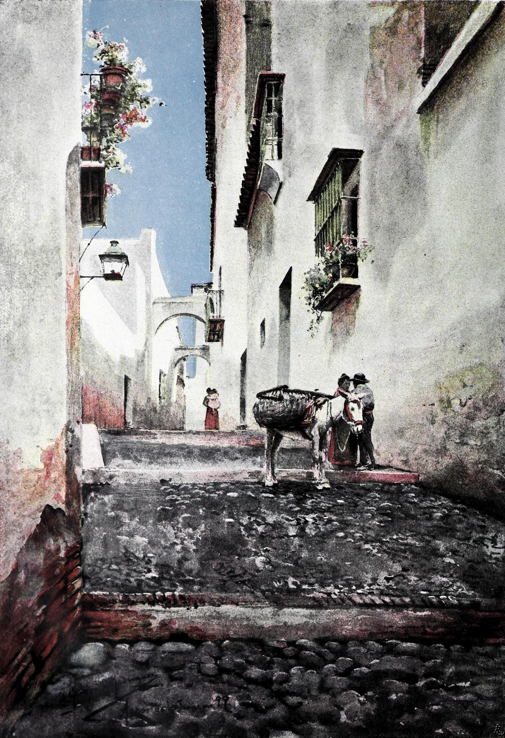 Paisajes andaluces, Arcos de la Frontera.